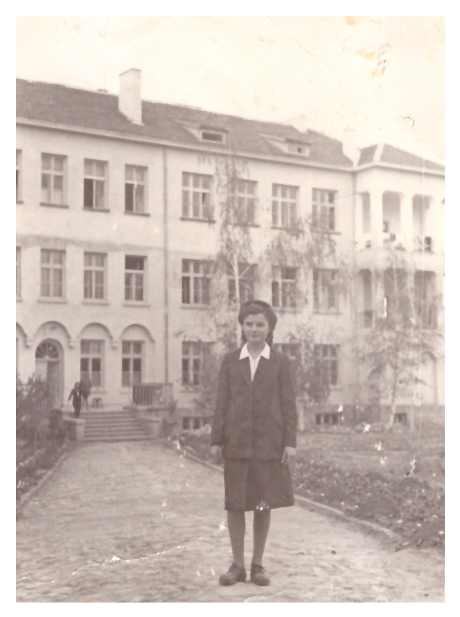 Девическата земеделска домакинска гимназия, 1946 г., снимка на Вергиния Йорданова Влахова - ученичка